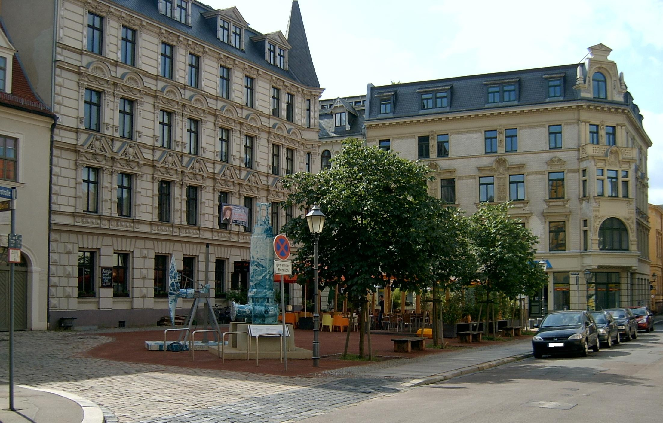 Der Kleine Berlin in Halle (Saale)